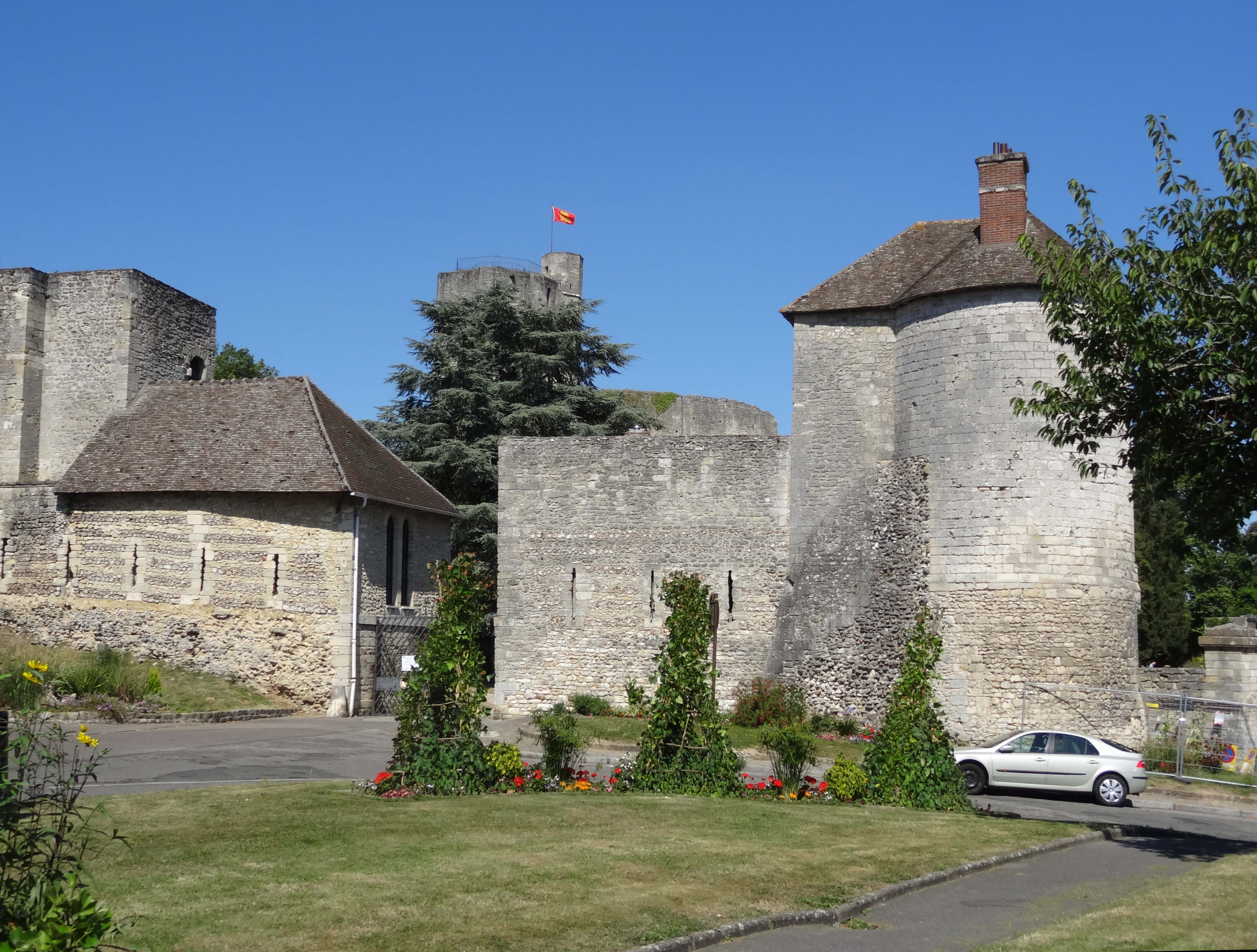 Château de Gisors - voir titre.